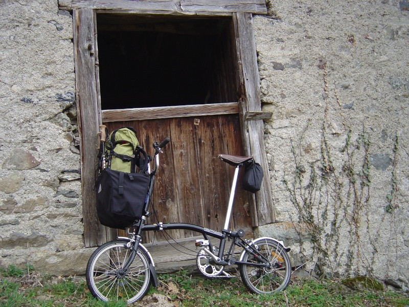 Brompton devant la porte d'une grange à Cauterets dans les Pyrénées